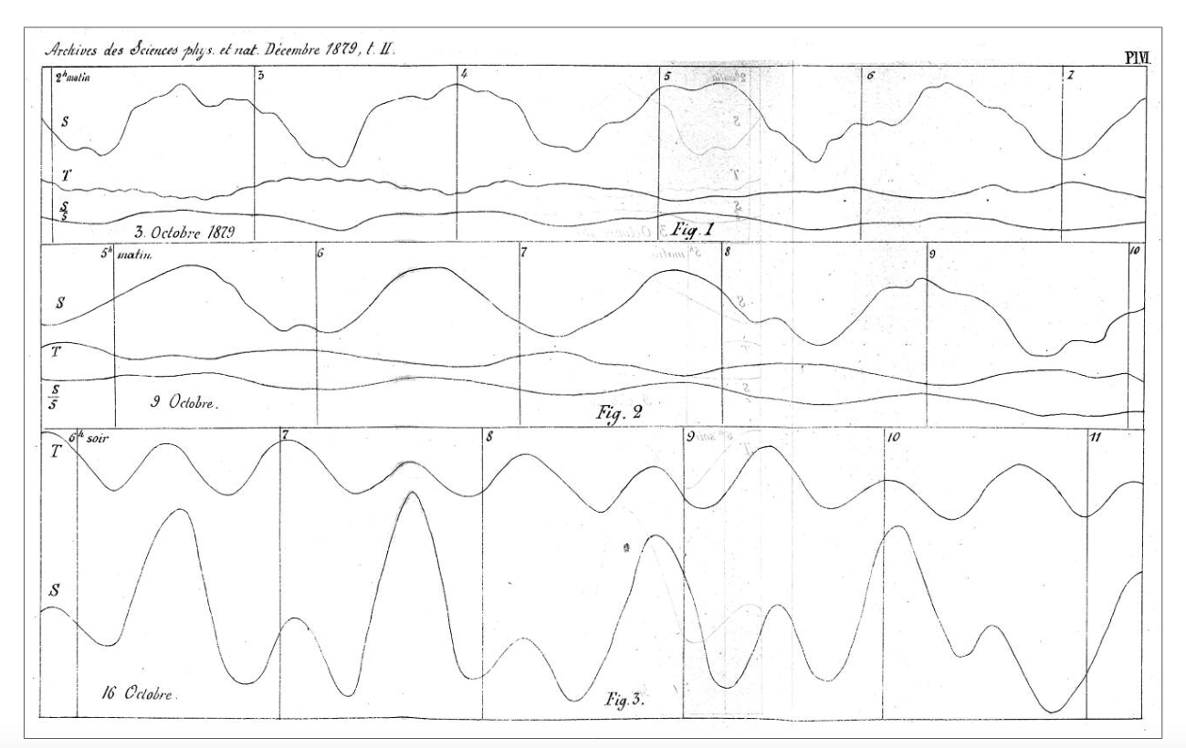 Mesures des oscillations du niveau du lac (« seiches lémaniques ») effectuées simultanément par Édouard Sarasin à la Tour-de-Peilz et Philippe Plantamour à Sécheron (Genève). Graphique de 1879.